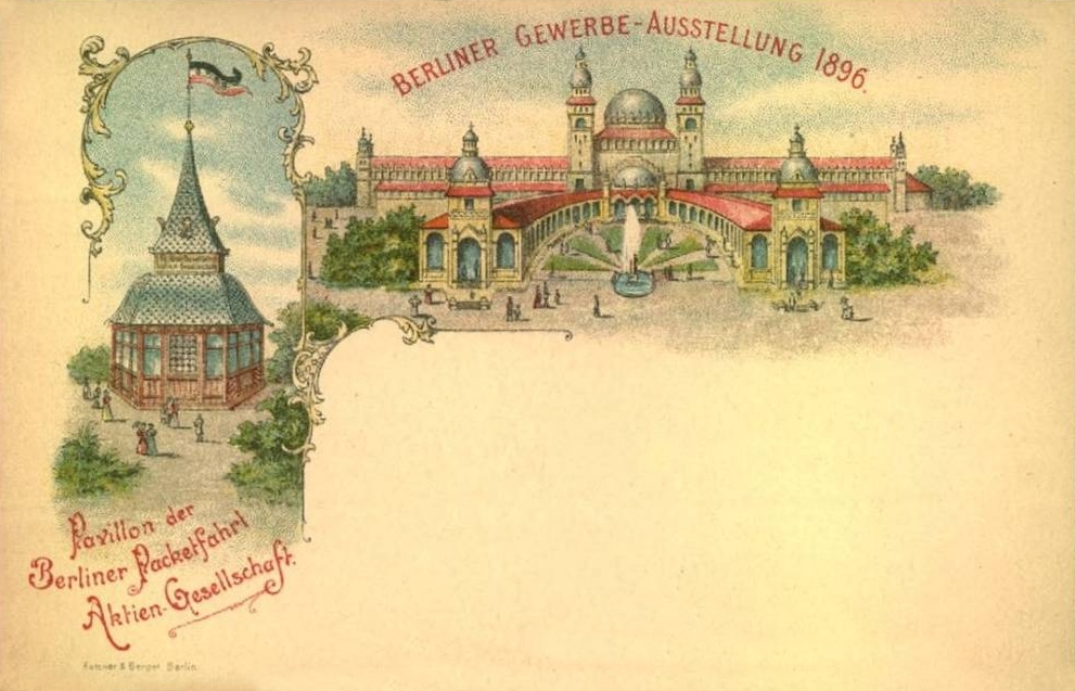 Ganzsache der Berliner Packetfahrt Gesellschaft zur Gewerbeausstellung 1869 in Berlin